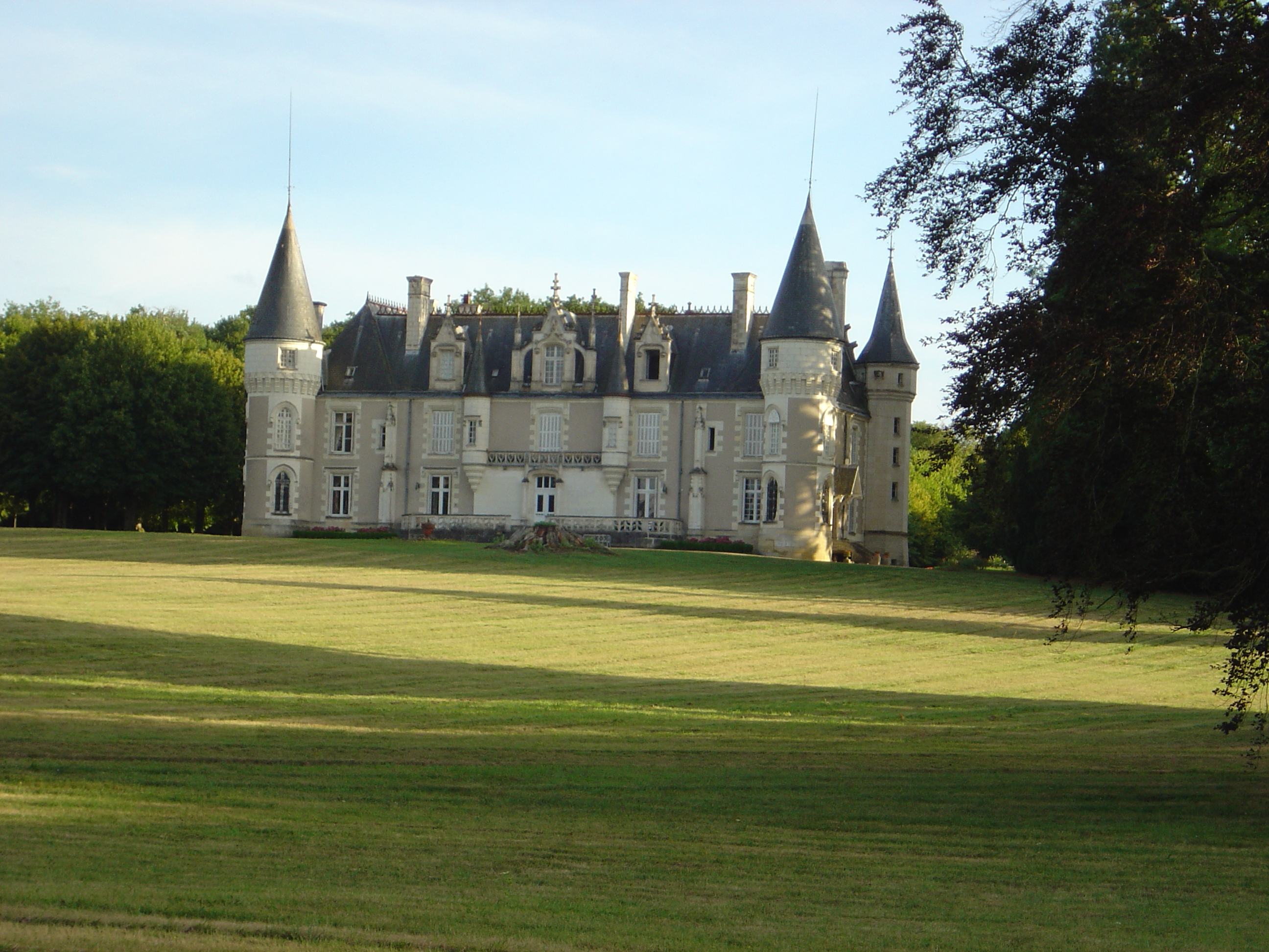 XVIIe et XIXe siècles Le château de Beauvais, dont le gros œuvre date au moins du XVIIe siècle, est modifié à la fin du XVIIIe siècle, totalement remanié en style gothique au milieu du XIXe siècle puis encore modifié de 1903 à 1911 par l'architecte Marcel Rohard. Le parc est redessiné à l'anglaise par le paysagiste Edouard André à partir de 1869. Avant le XIIe siècle, Beauvais appartenait à l'abbaye Saint Julien de Tours puis devient un fief laïc relevant d'Amboise, donc du roi. Plus tard en 1815, le fils de Clément de Ris est accusé d'avoir caché des caisses d'or et d'argent dans le parc qui est fouillé de fond en comble. En juin 1940, lors du repli du gouvernement français de Paul Reynaud sur Bordeaux, de passage à Tours, Charles de Gaulle, alors sous secrétaire d'état à la défense nationale, loge quelques jours à Beauvais.